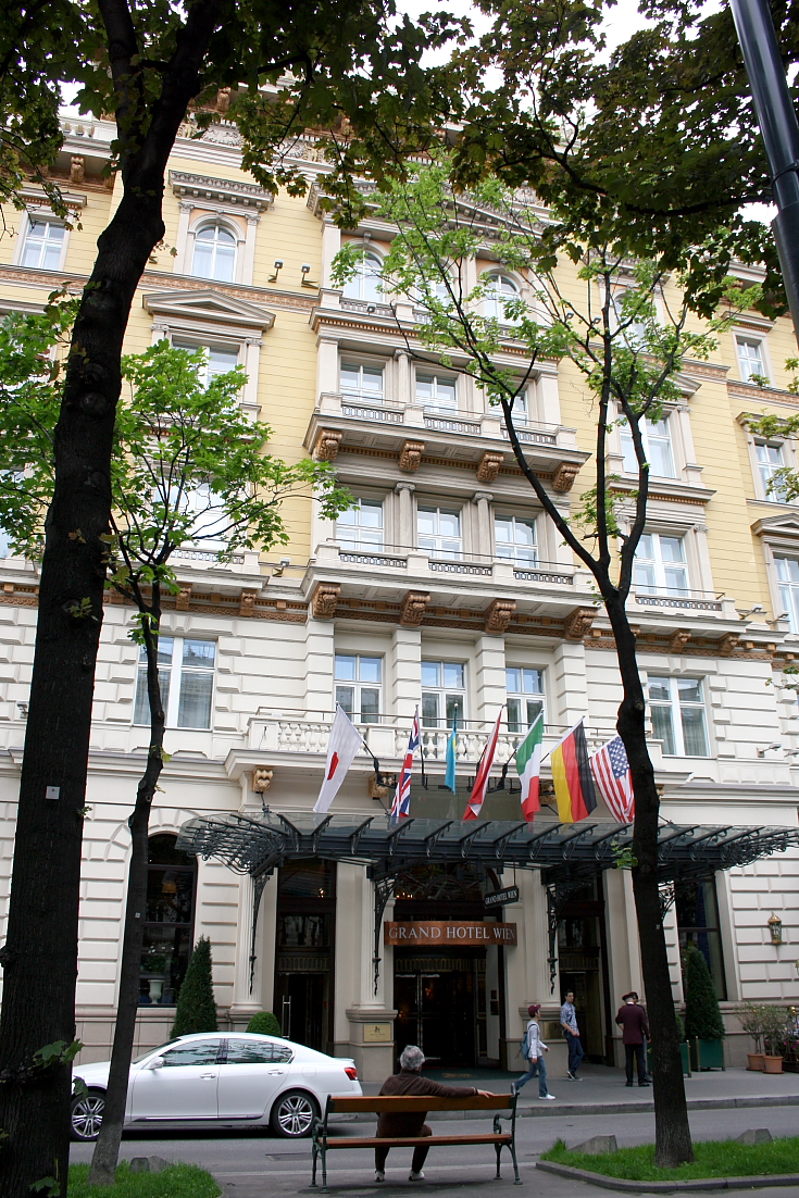 Grand Hotel Wien am Kärntner Ring 9 im 1. Wiener Gemeindebezirk